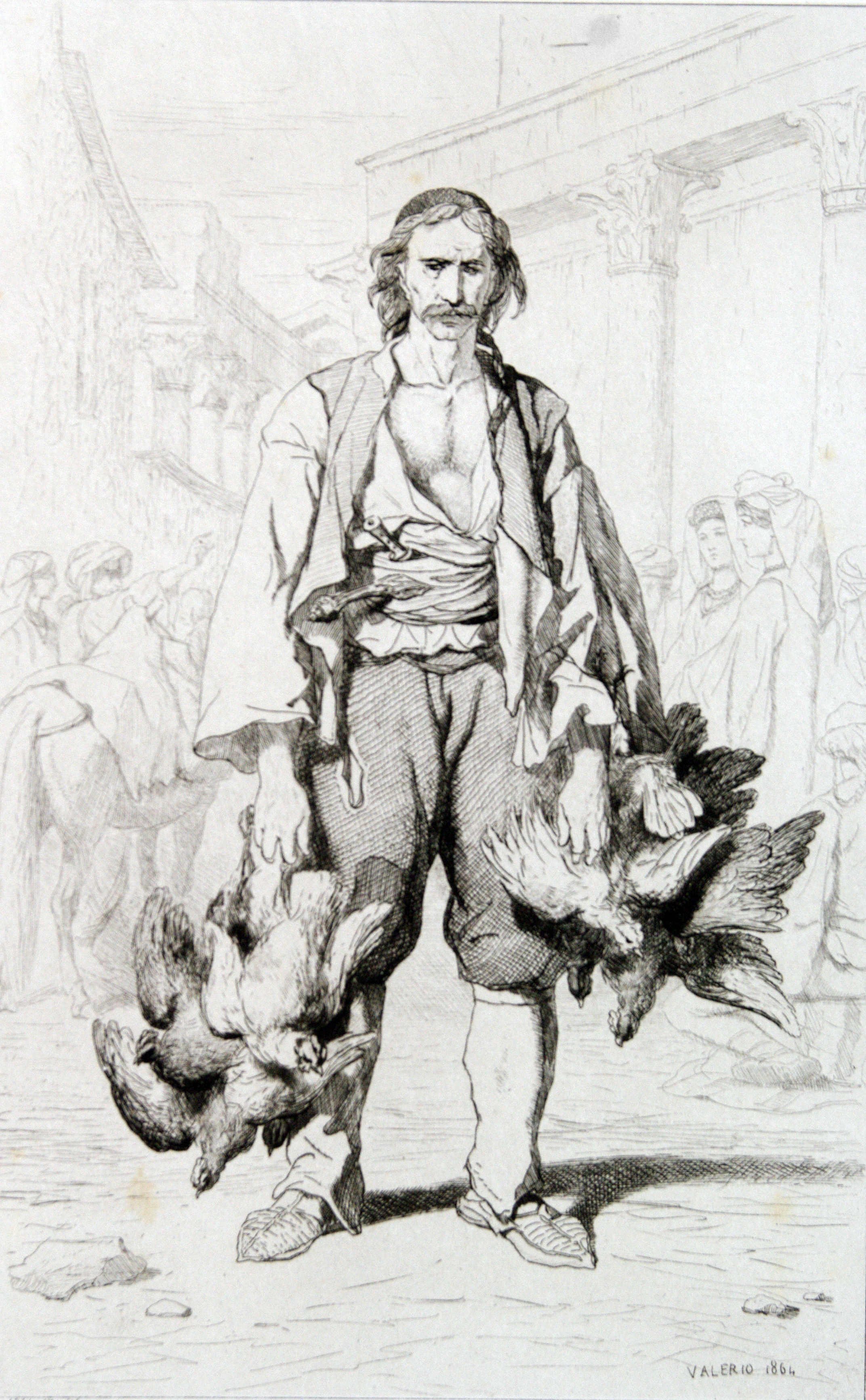 Paysan Morlaques des environs de Spalato